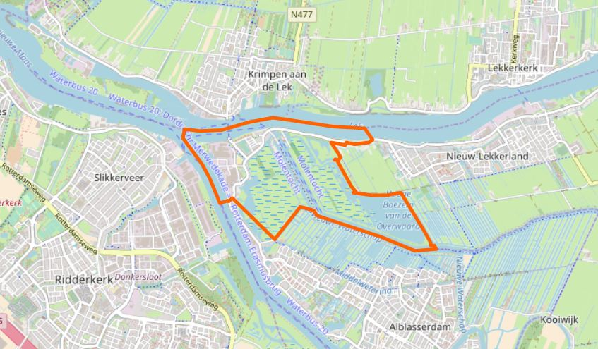 Géolocalisation de Kinderdijk.